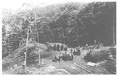 Српски (ћирилица): Група мајданпечких рудара снимљена крајем 19. века.